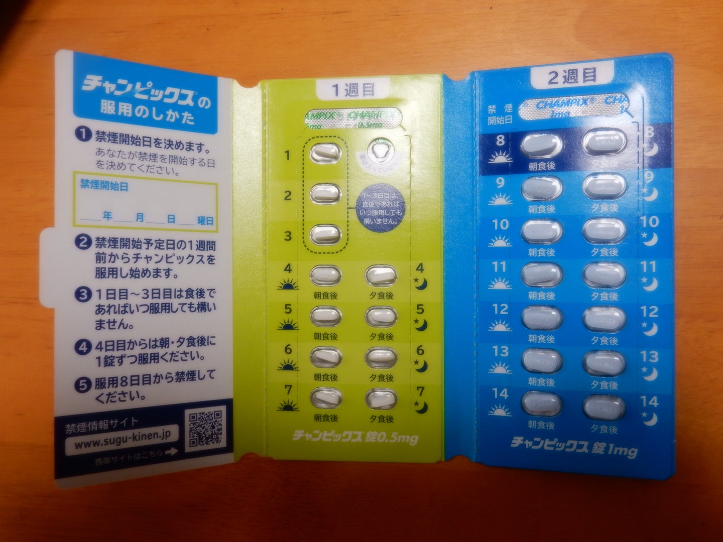 バニクレリン製剤 禁煙薬